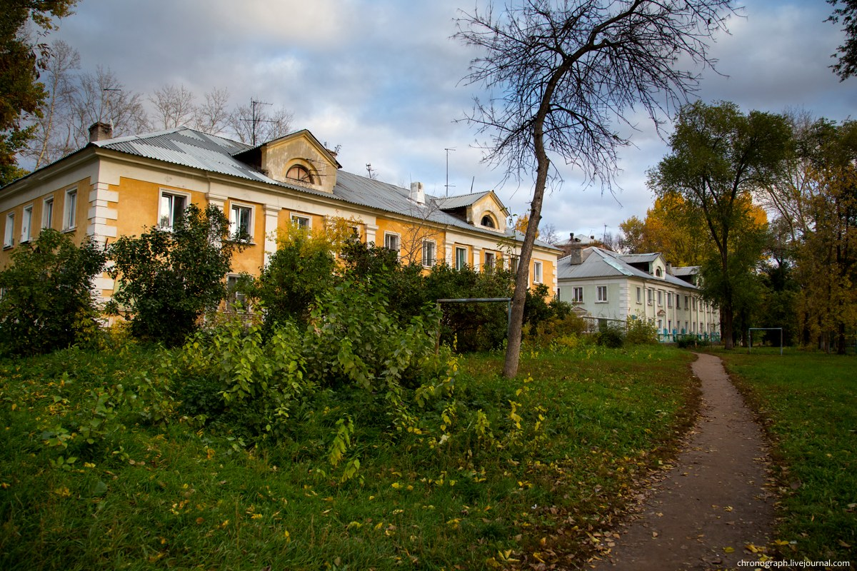 Застройка посёлка Красная Глинка, Самара, Россия